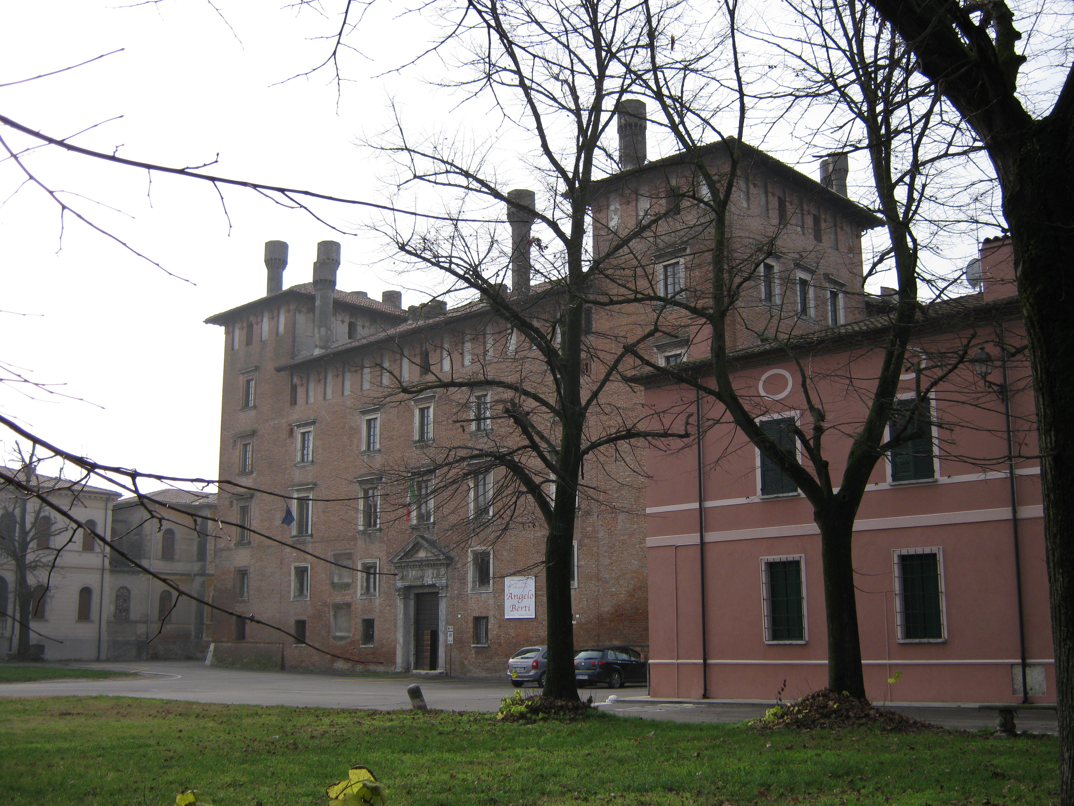 Palazzo ducale, Revere (Mantova)